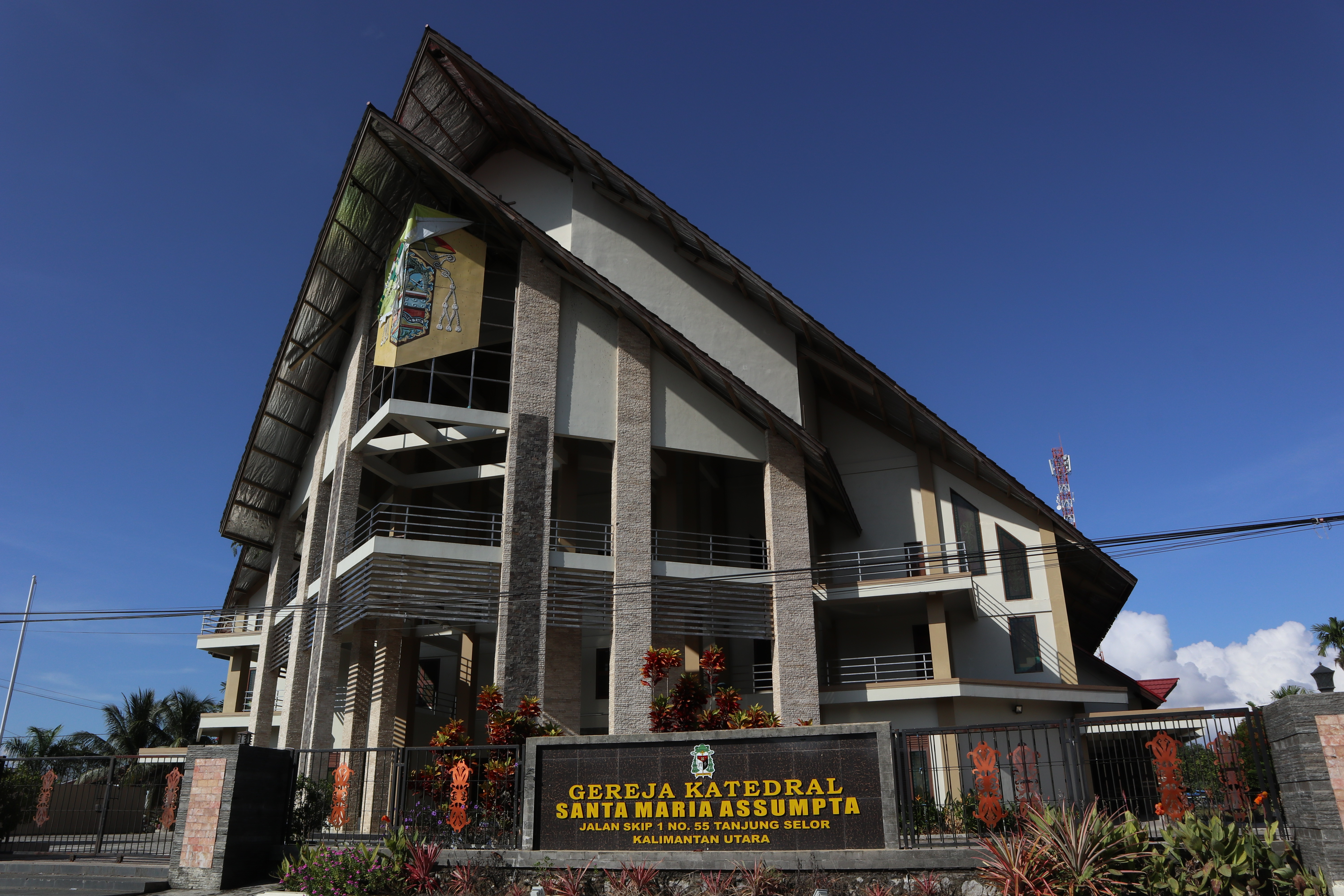 Gereja Katedral Santa Maria Assumpta di kota Tanjung Selor, Kabupaten Bulungan, Kalimantan Utara.